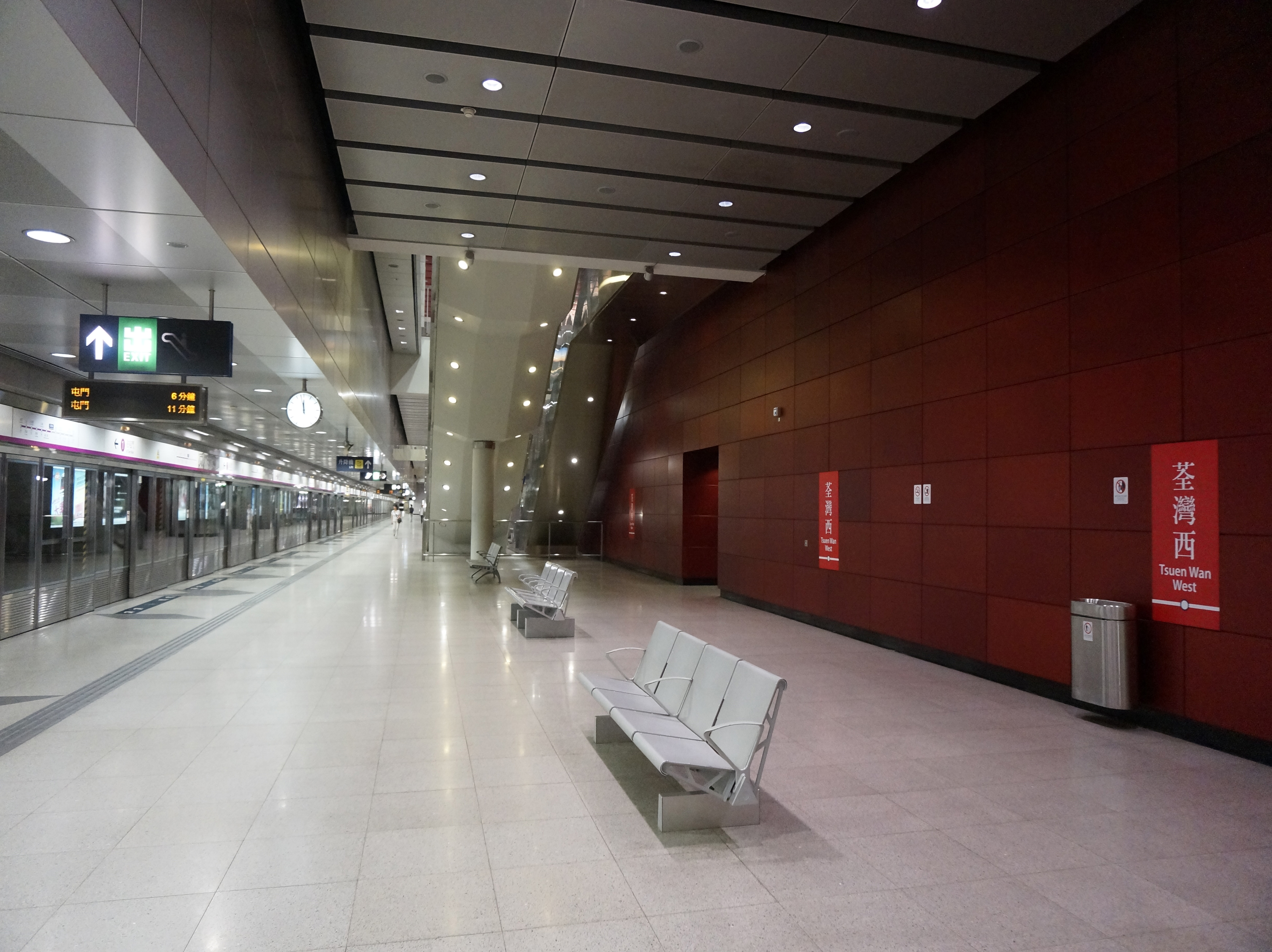 荃灣西港鐵站月台